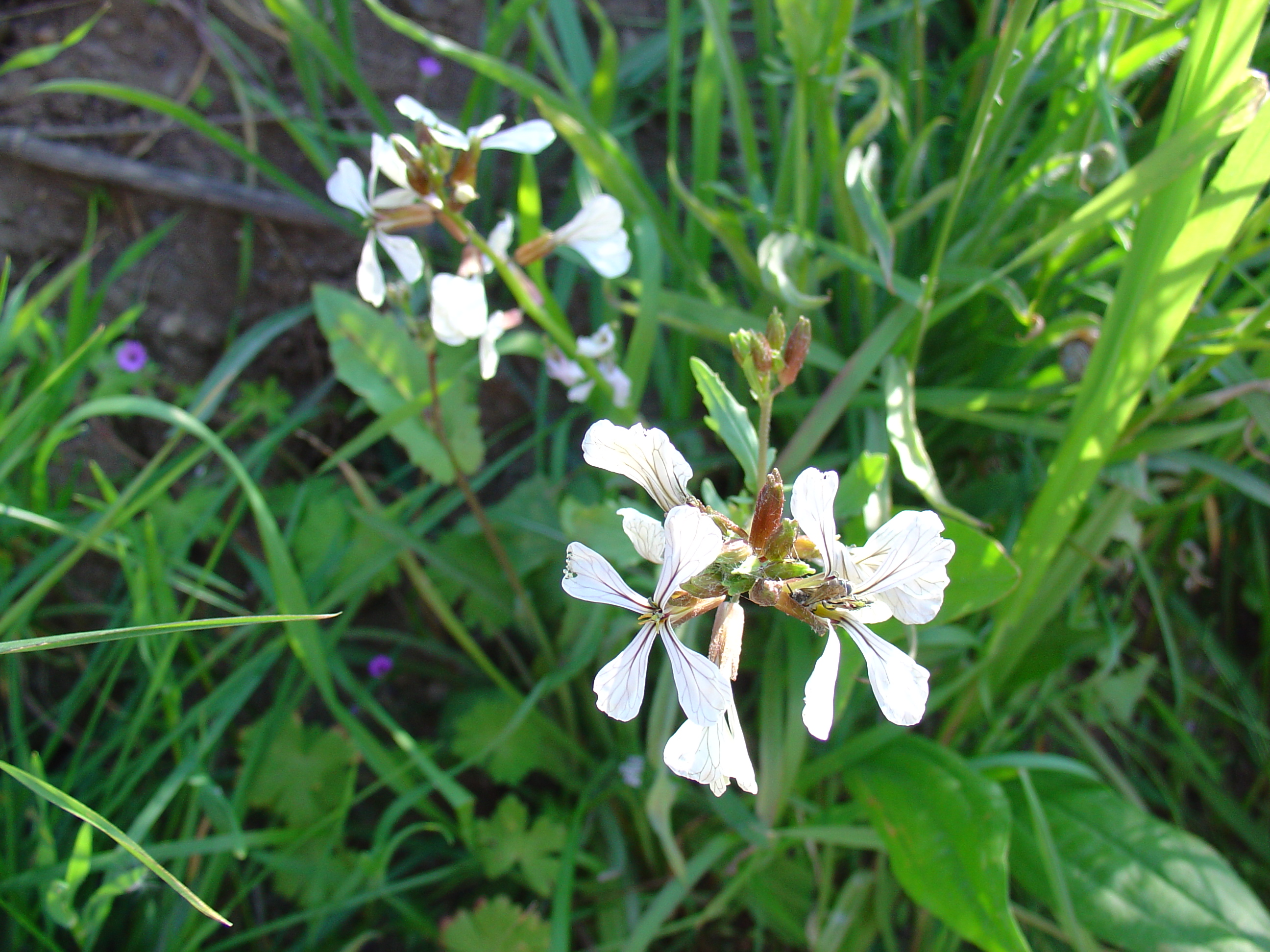 Eruca vesicaria procedente de margen de camino en Sierra Minera, Murcia, Spain